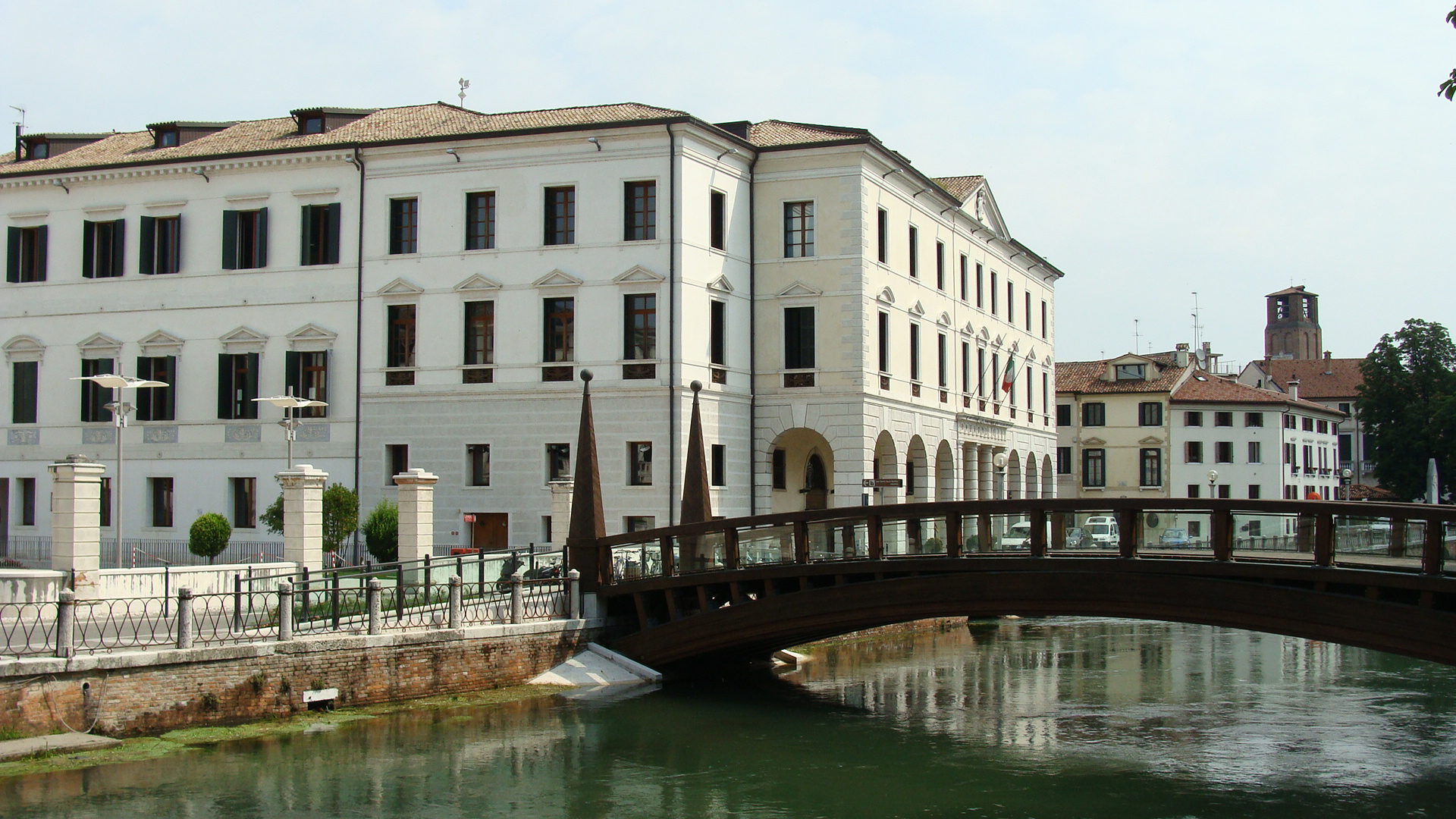 Vista del ponte in legno sul fiume Sile all'altezza di riviera Garibaldi e riviera Santa Margherita a Treviso.